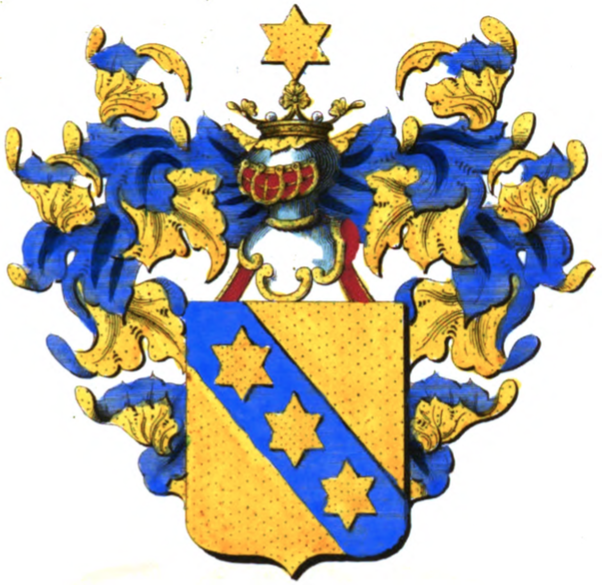 Armoiries de la famille Pouppez de Kettenis de Hollaeken